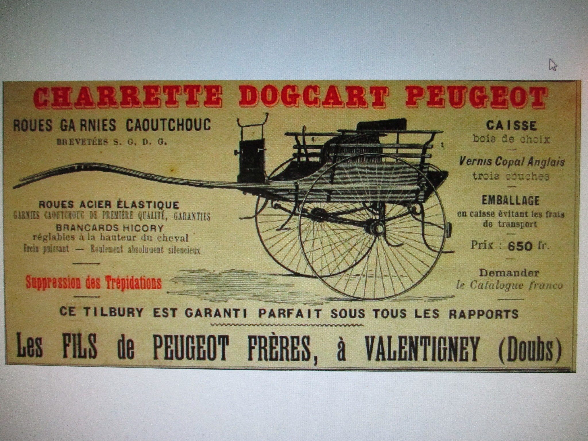 Affiche publicitaire charrette Dogcart Peugeot " Les Fils de Peugeot Frères " 1892